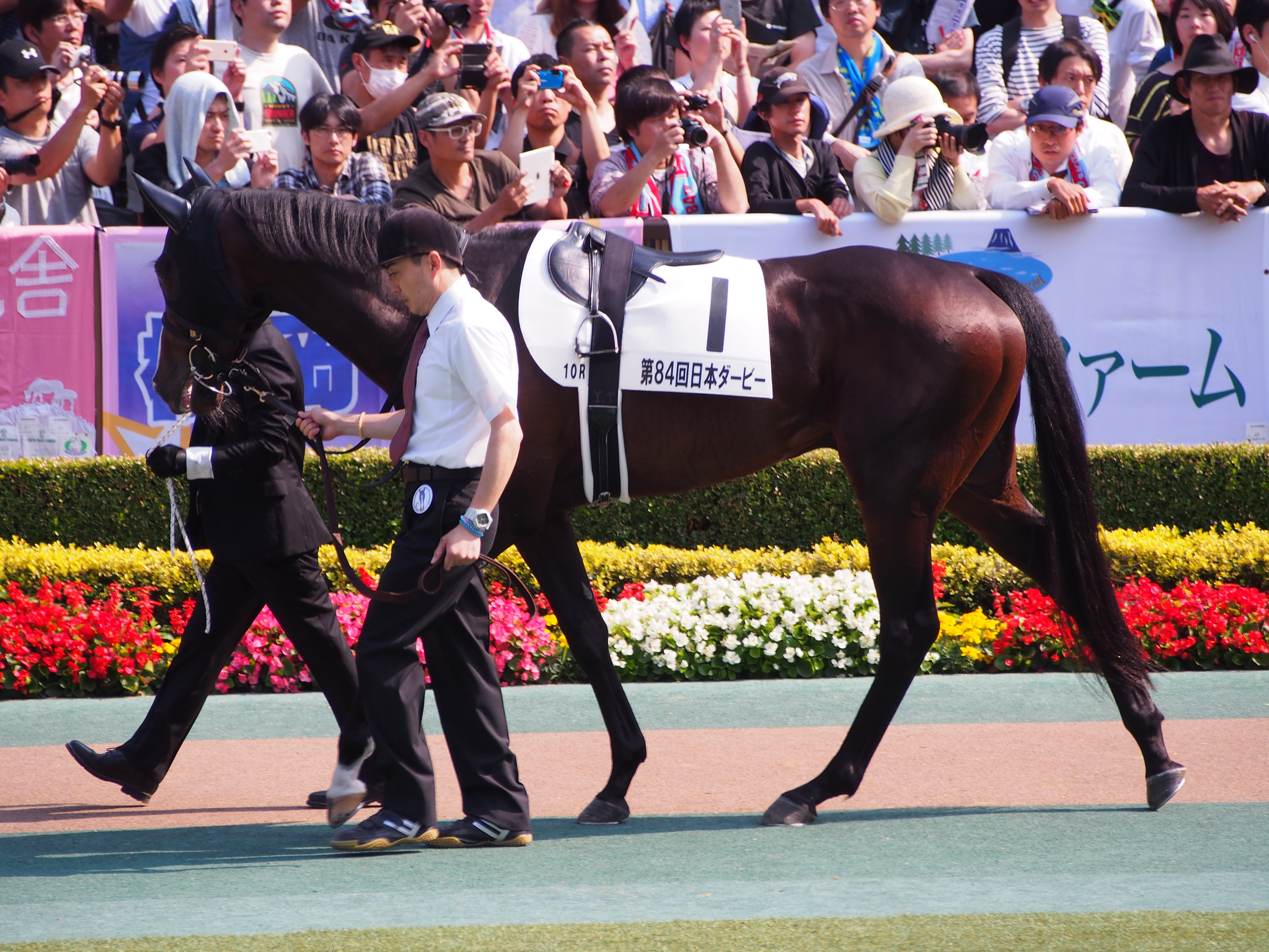 10R Tokyo Yushun Japanese Derby 東京優駿(日本ダービー)